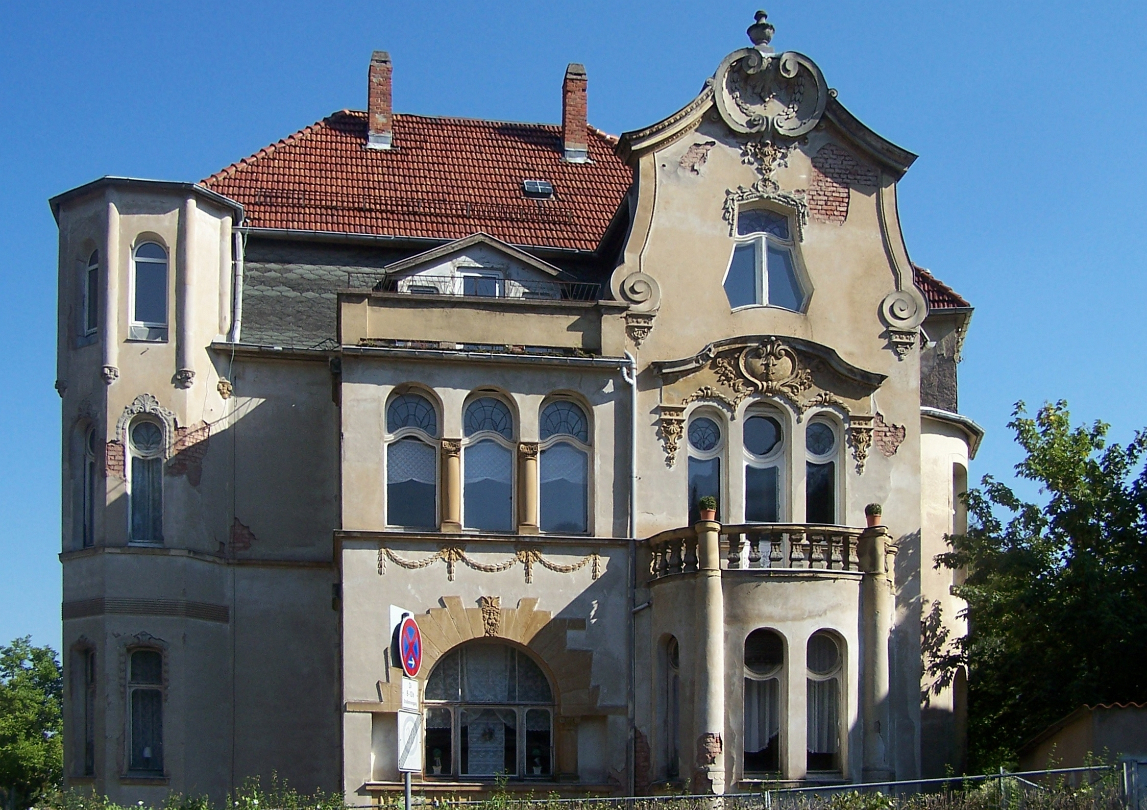 Das Haus Mariental 17 an der Nordseite des Prinzenteiches gelegen, wurde im Jahr 1906 vom Architekten Krämer für den Bauunternehmer Heinrich Tischer erbaut. Das reich mit Putz- und Stuckornamenten verzierte Haus ist ein Baudenkmal der Wartburgstadt.